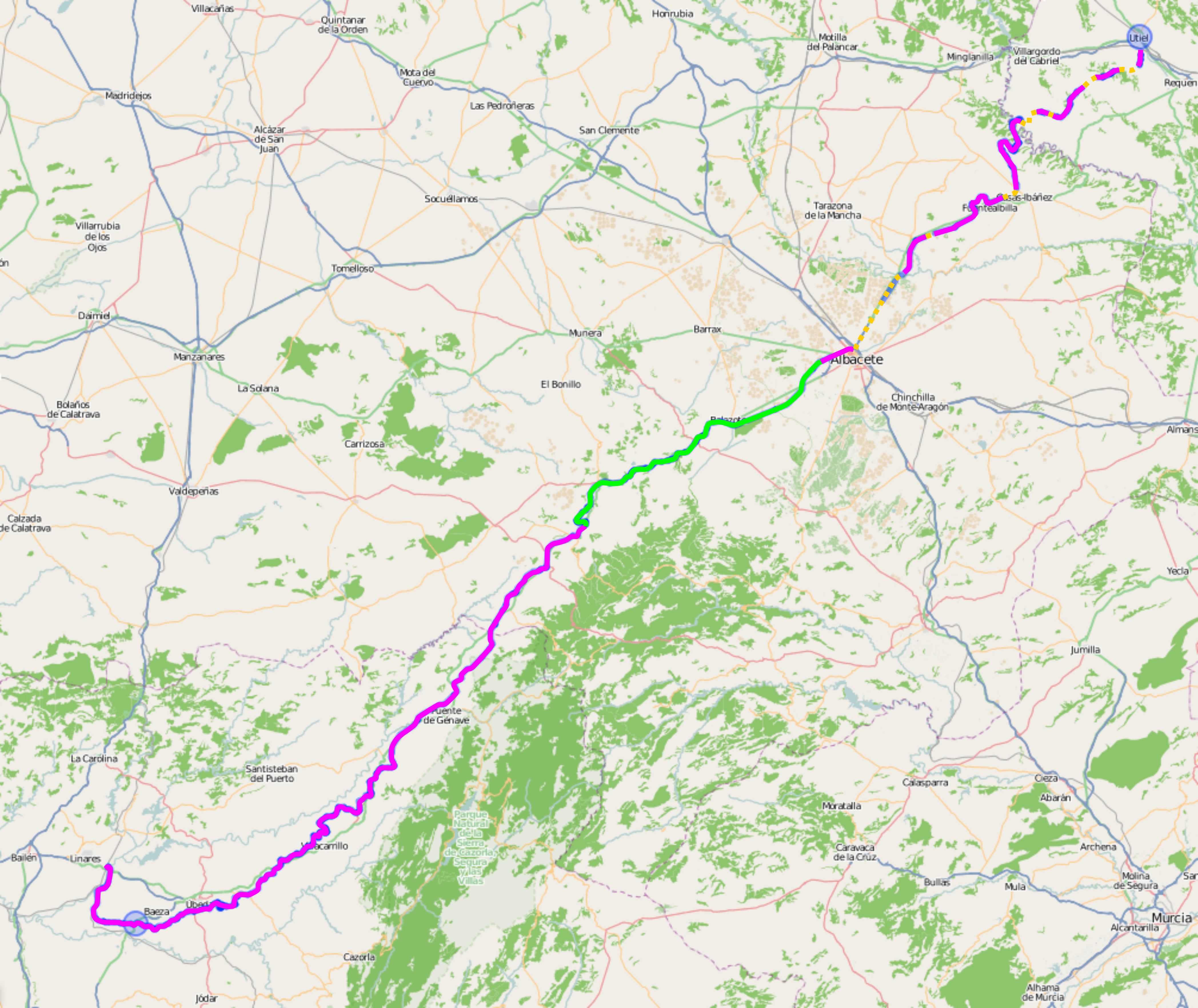 Ferrocarril inconclusio Baeza - Albacete - Utiel. verde: vía verde, amarillo: sin construcciones